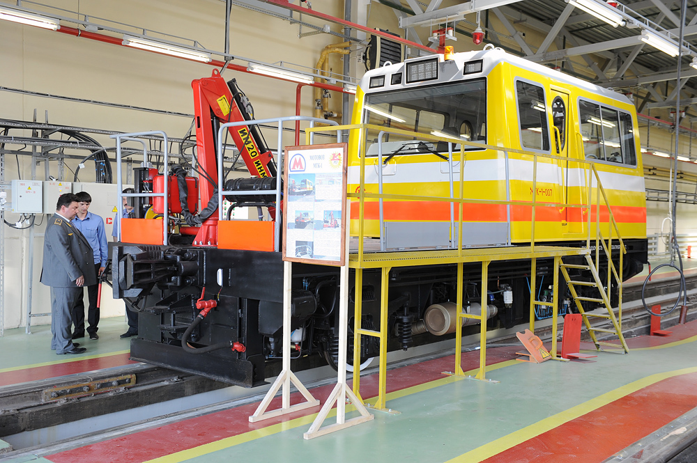 Мотовоз МТК1-007 в электродепо Печатники.